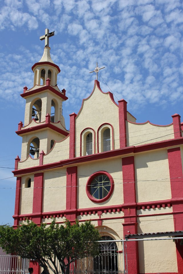 fotografia de Jorge Luis de los Santos Trujillo